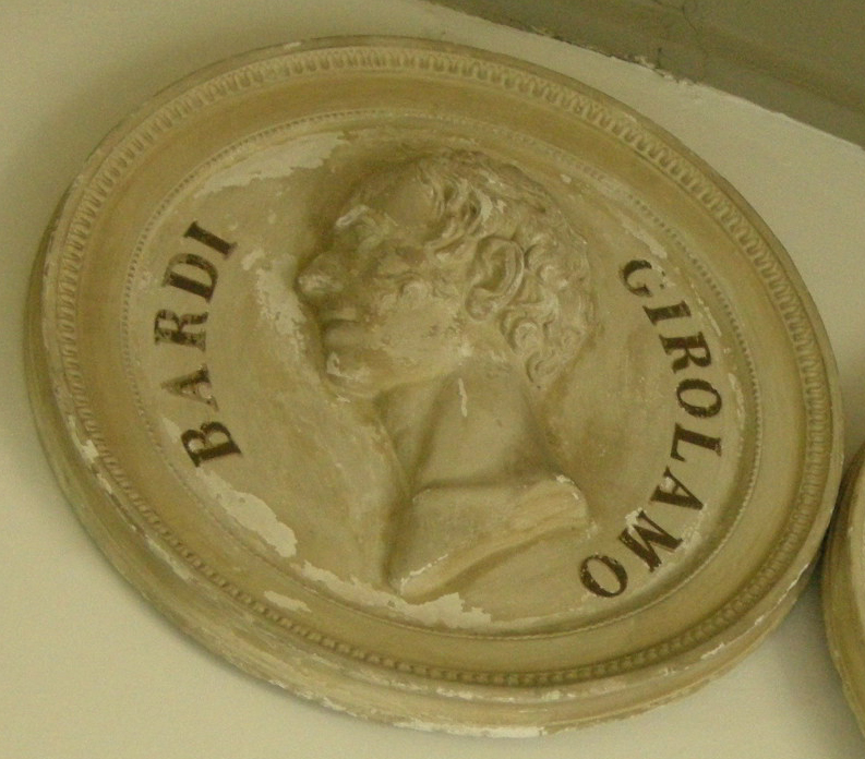 Specola, medaglione di girolamo bardi